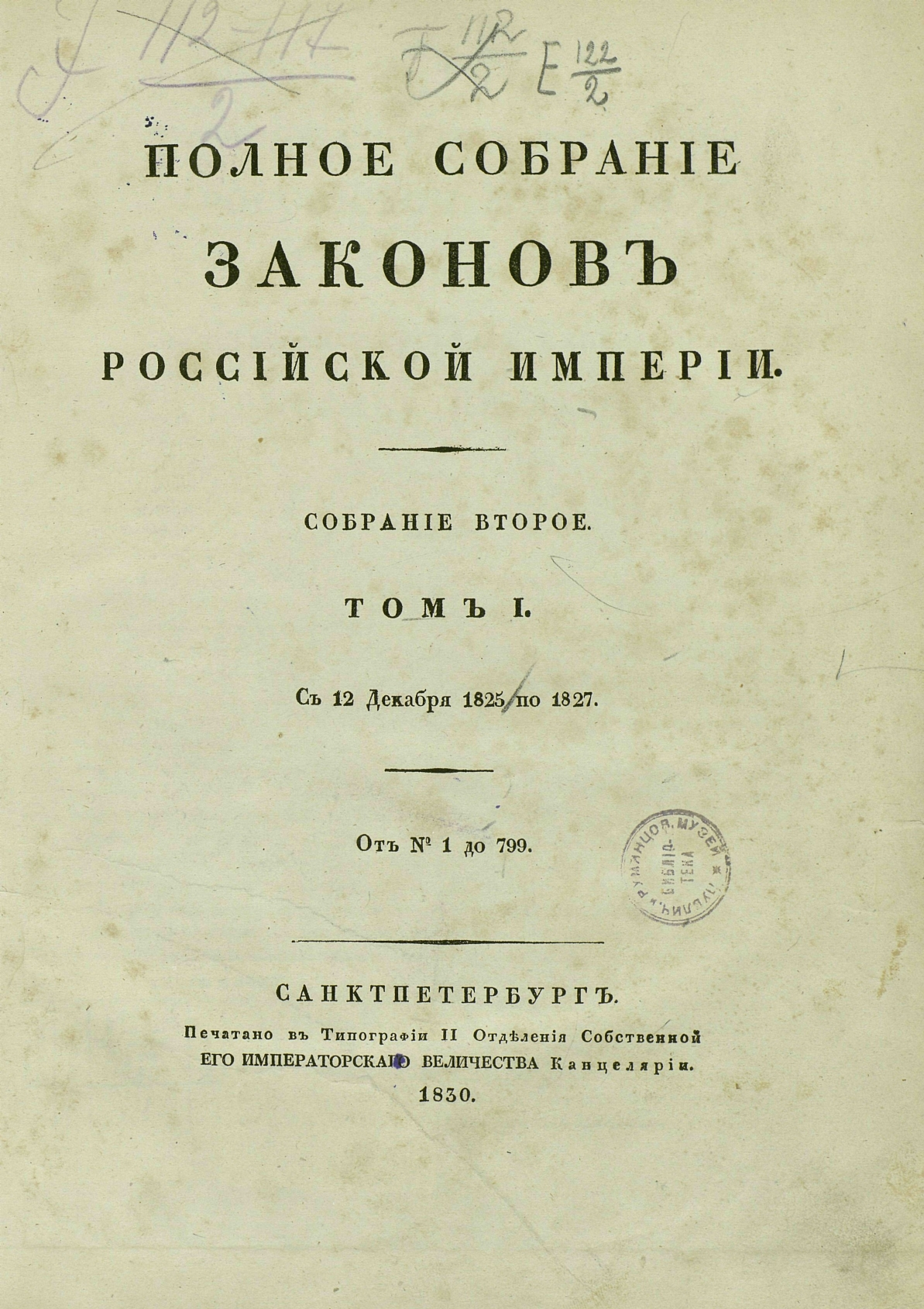 Полное собрание законов Российской империи (собрание 2), том 1